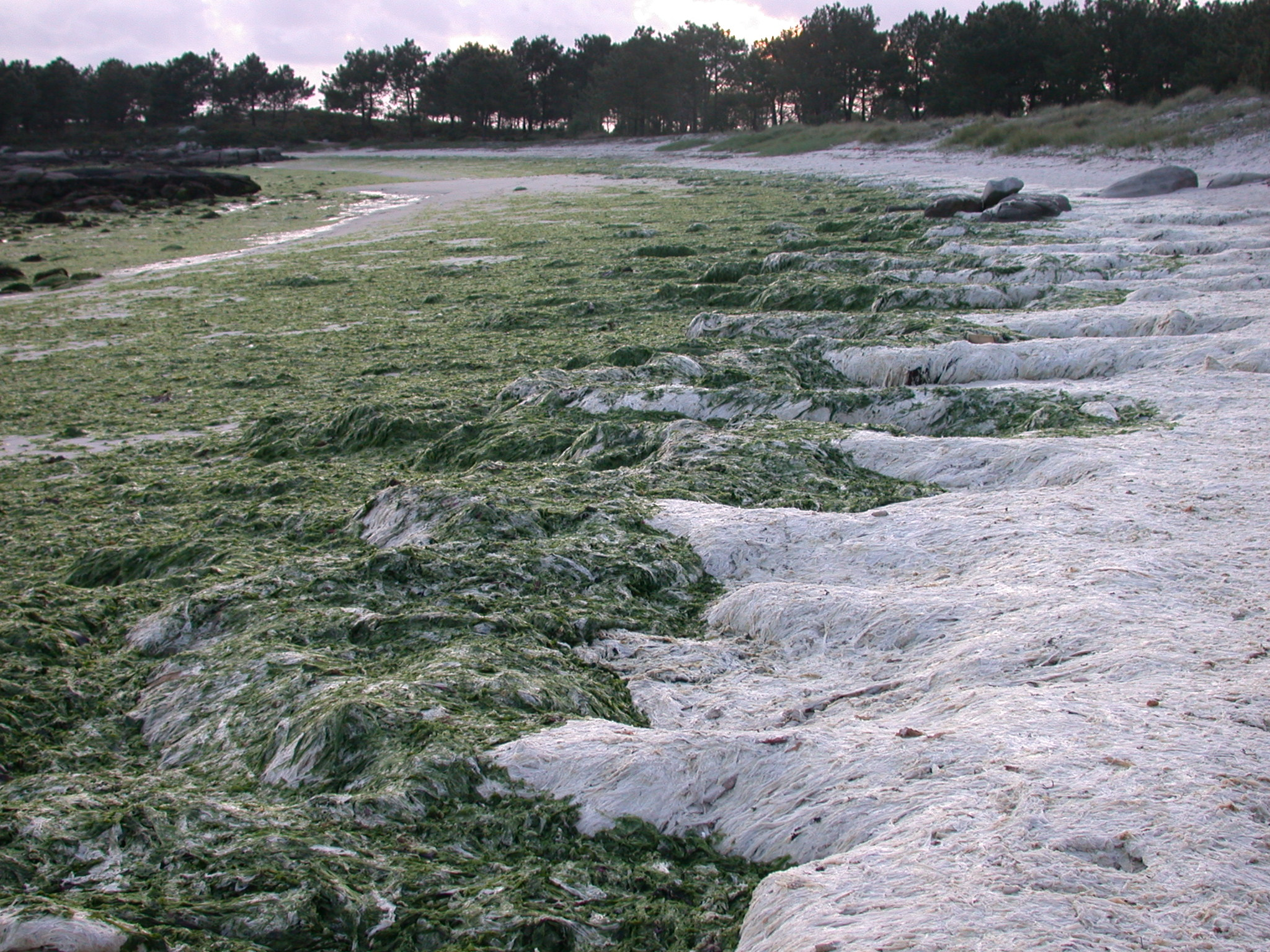 Marea de algas na Praia de Xestelas, Illa de Arousa